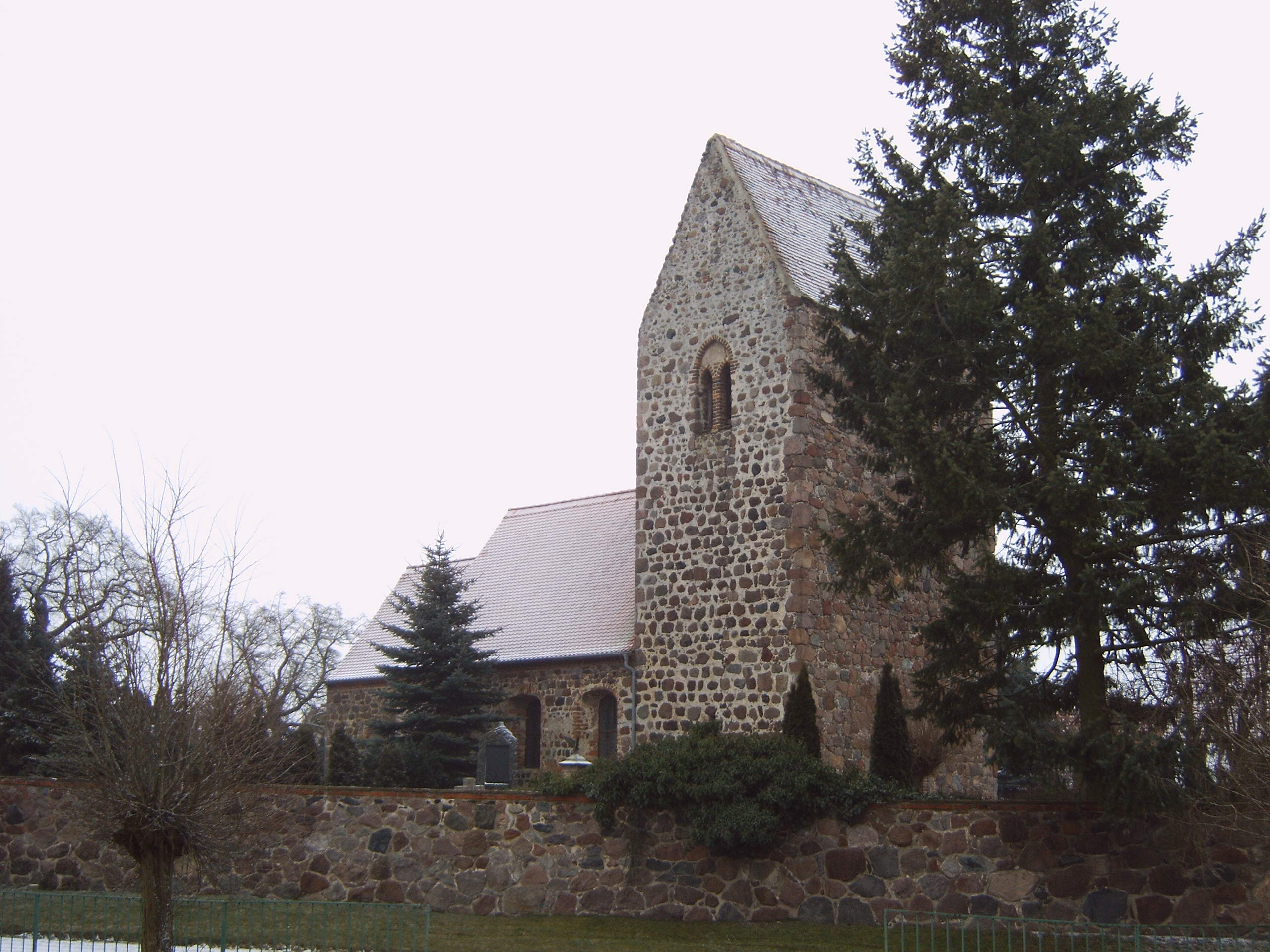 Dorfkirche in Gohre (Deutschland, Sachsen-Anhalt), Bild aufgenommen von Olaf Meister am 3.2.2006